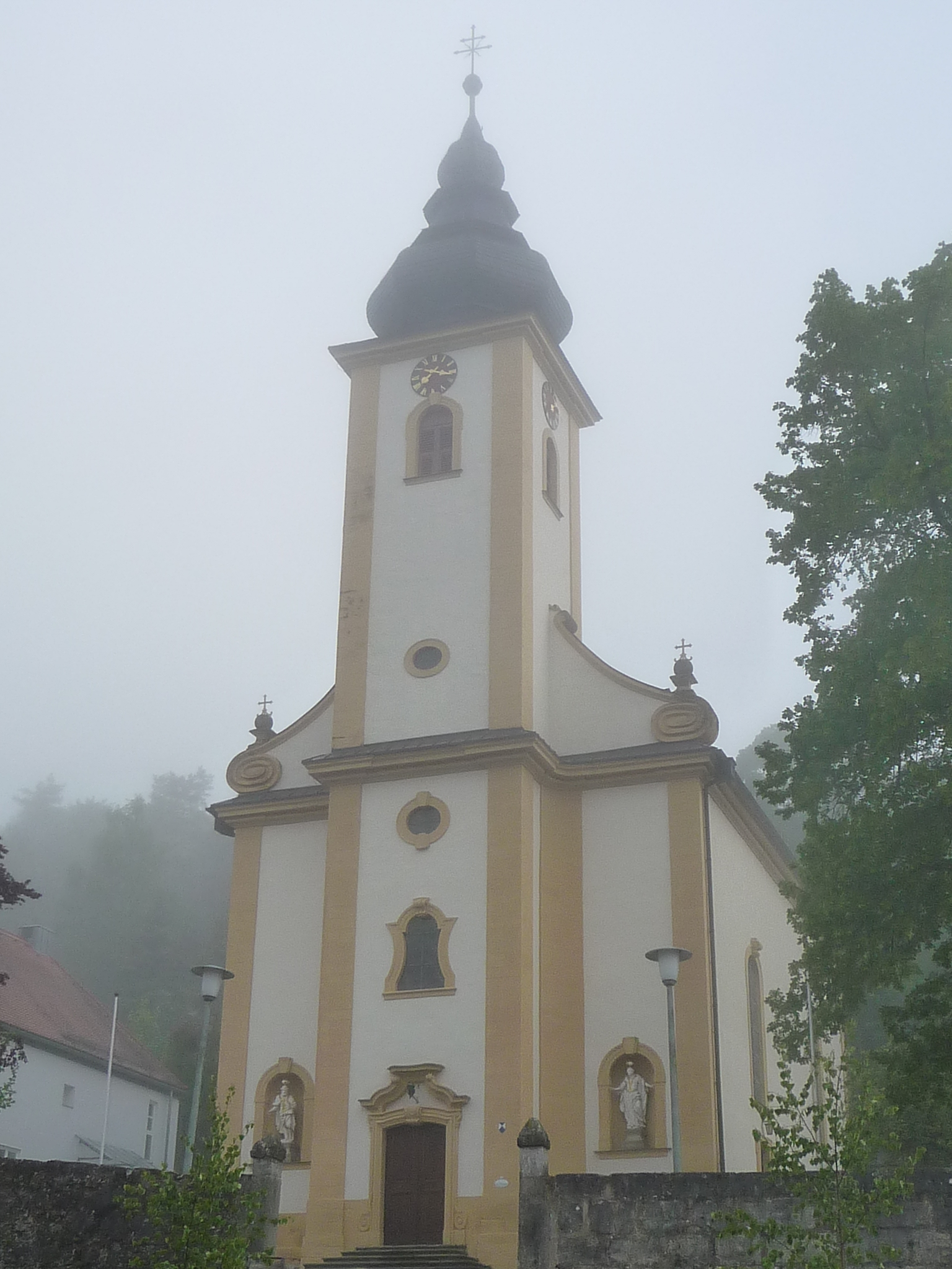 Martinuskirche (Nankendorf)